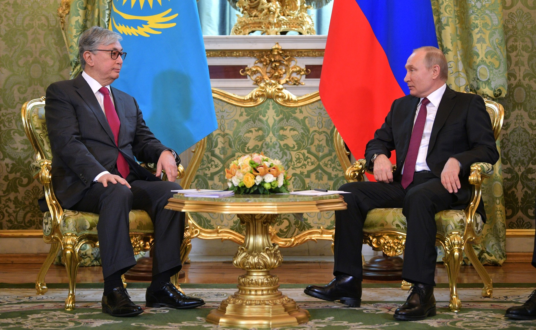 Президент Российской Федерации Владимир Путин с Президентом Республики Казахстан Касым-Жомартом Токаевым